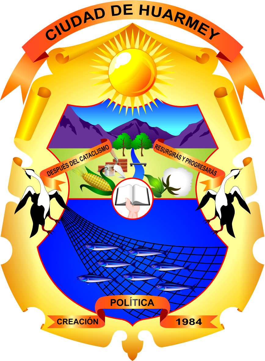 Distrito de Huarmey - Provincia de Huarmey - Región Ancash